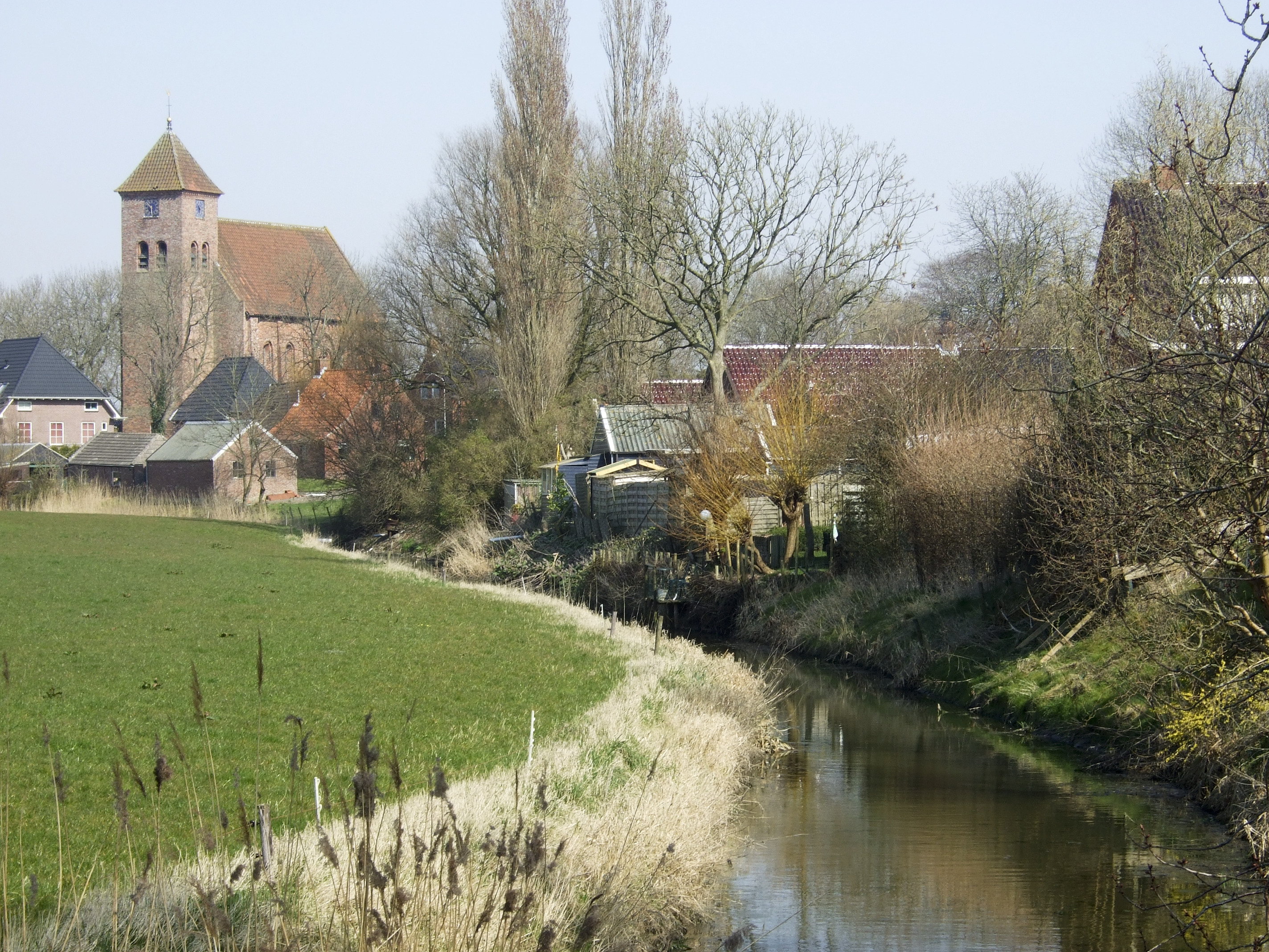 Het kleine Diep: Een watertje dat van het dorp naar het Termunter Zijldiep stroomt (opmerking: Publicatie: TRAP Appingedam en Delfzijl (Cultuur Historische Routes in Nederland - 59))